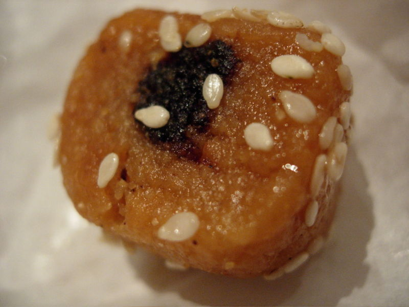 Makroud